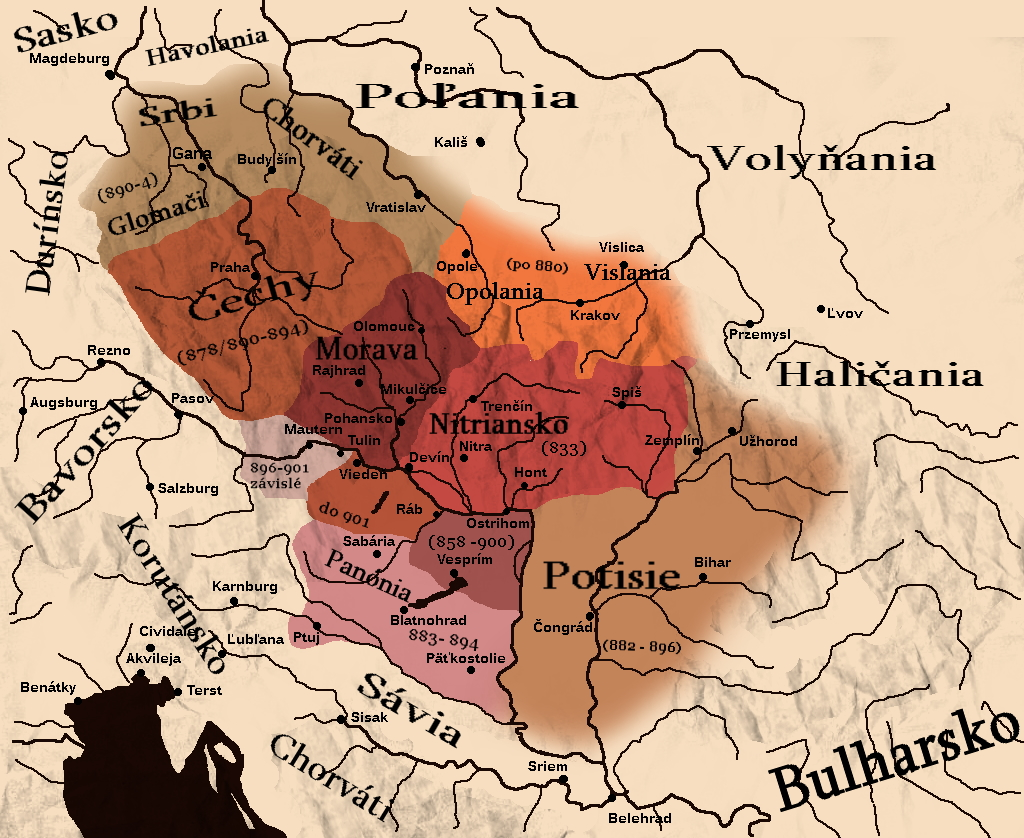 Mapa Veľkomoravskej ríše a jej územného rozssahu